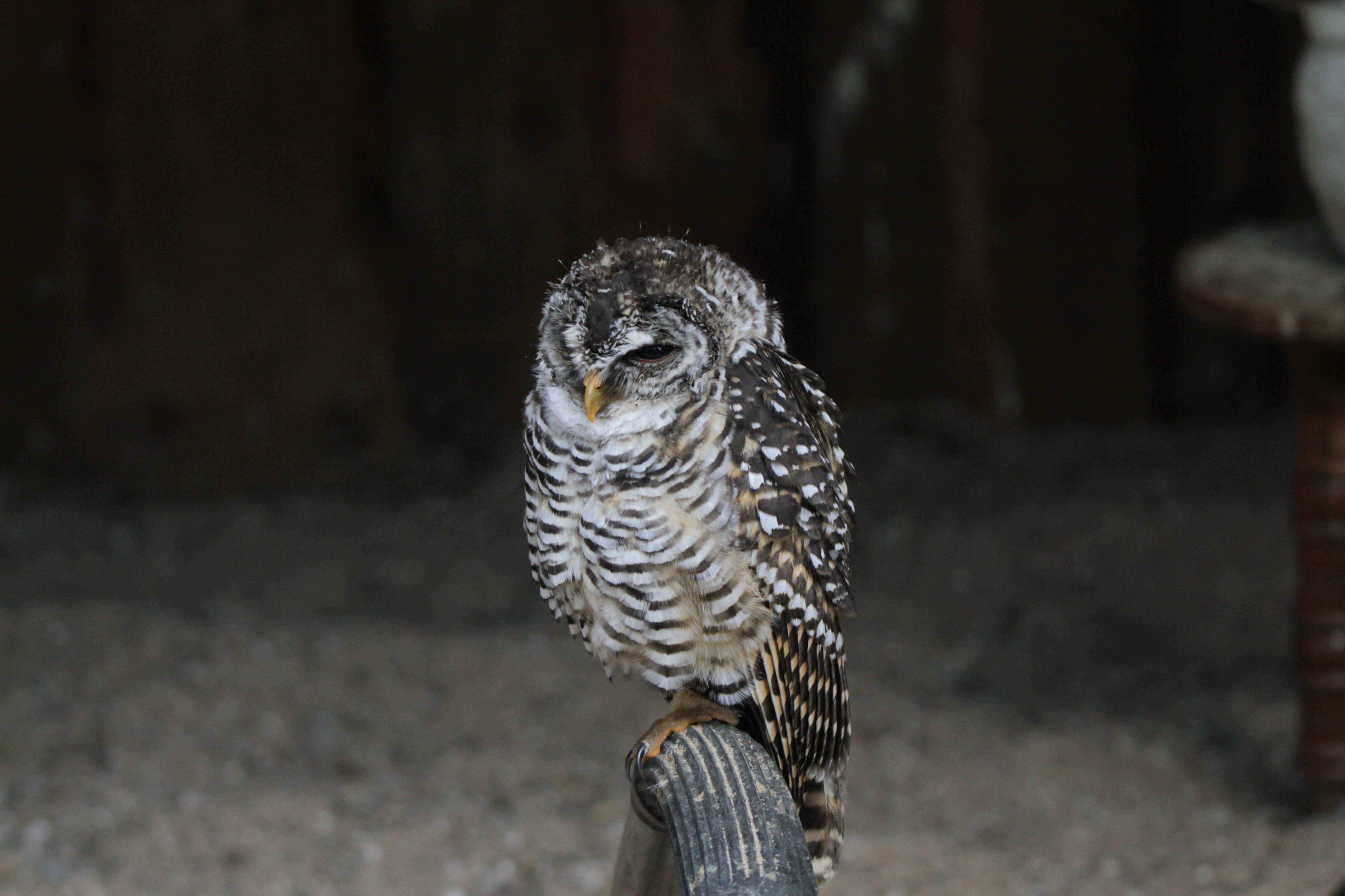 Hochwildschutzpark Rheinböllen